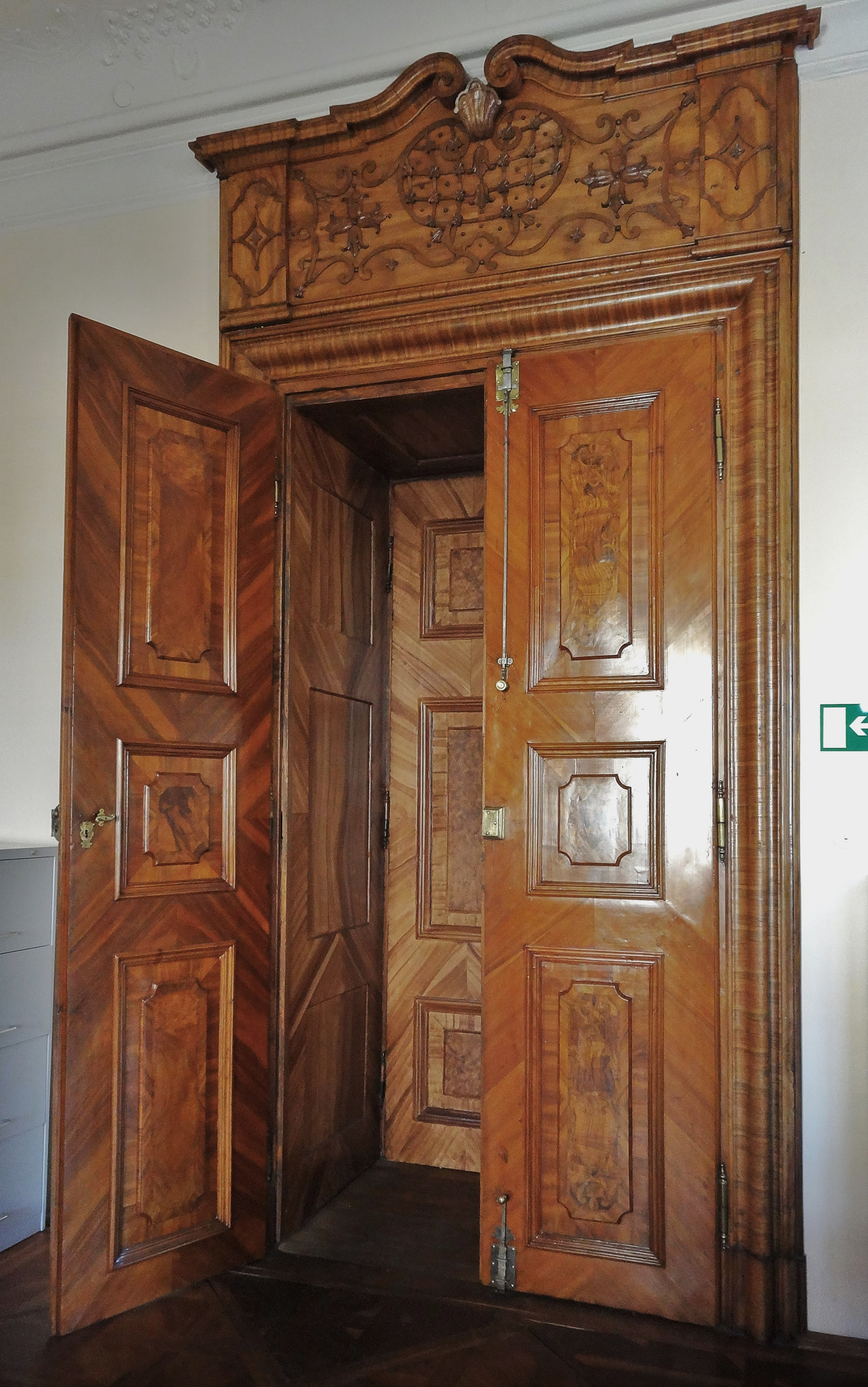 Palais Goess (Klagenfurt am Wörthersee), Innentüre